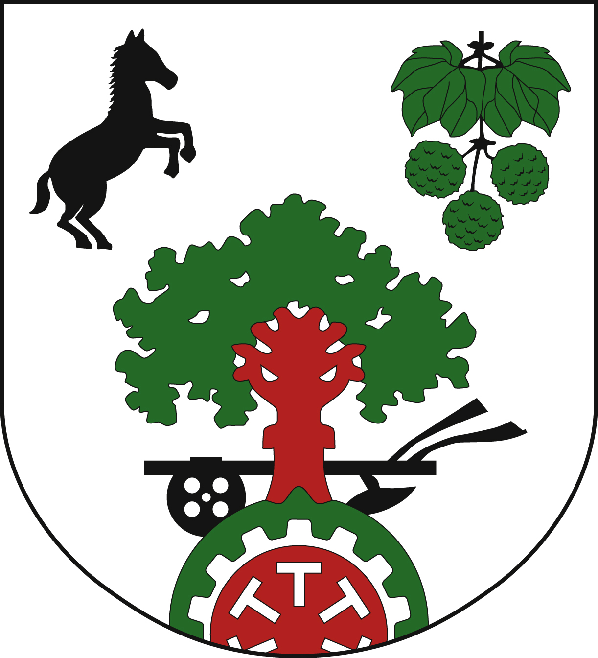 Wappen der Gemeinde Großolbersdorf